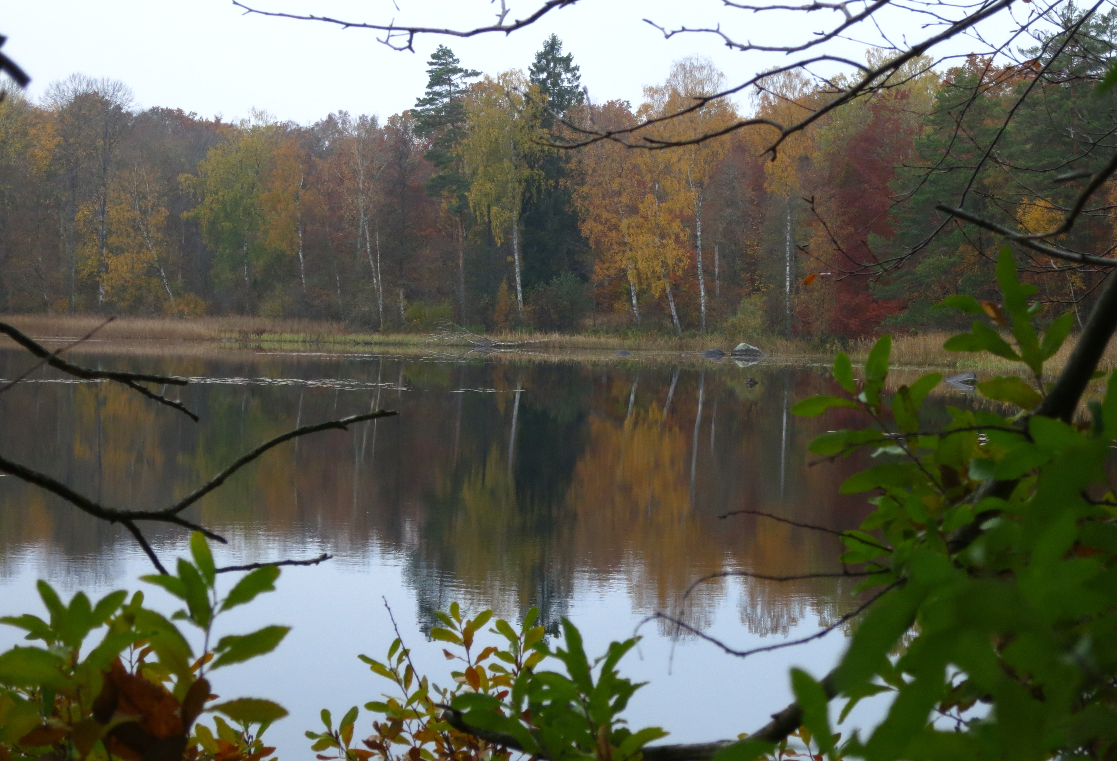 Sjön Grimsjögöl, Emmaboda kommun